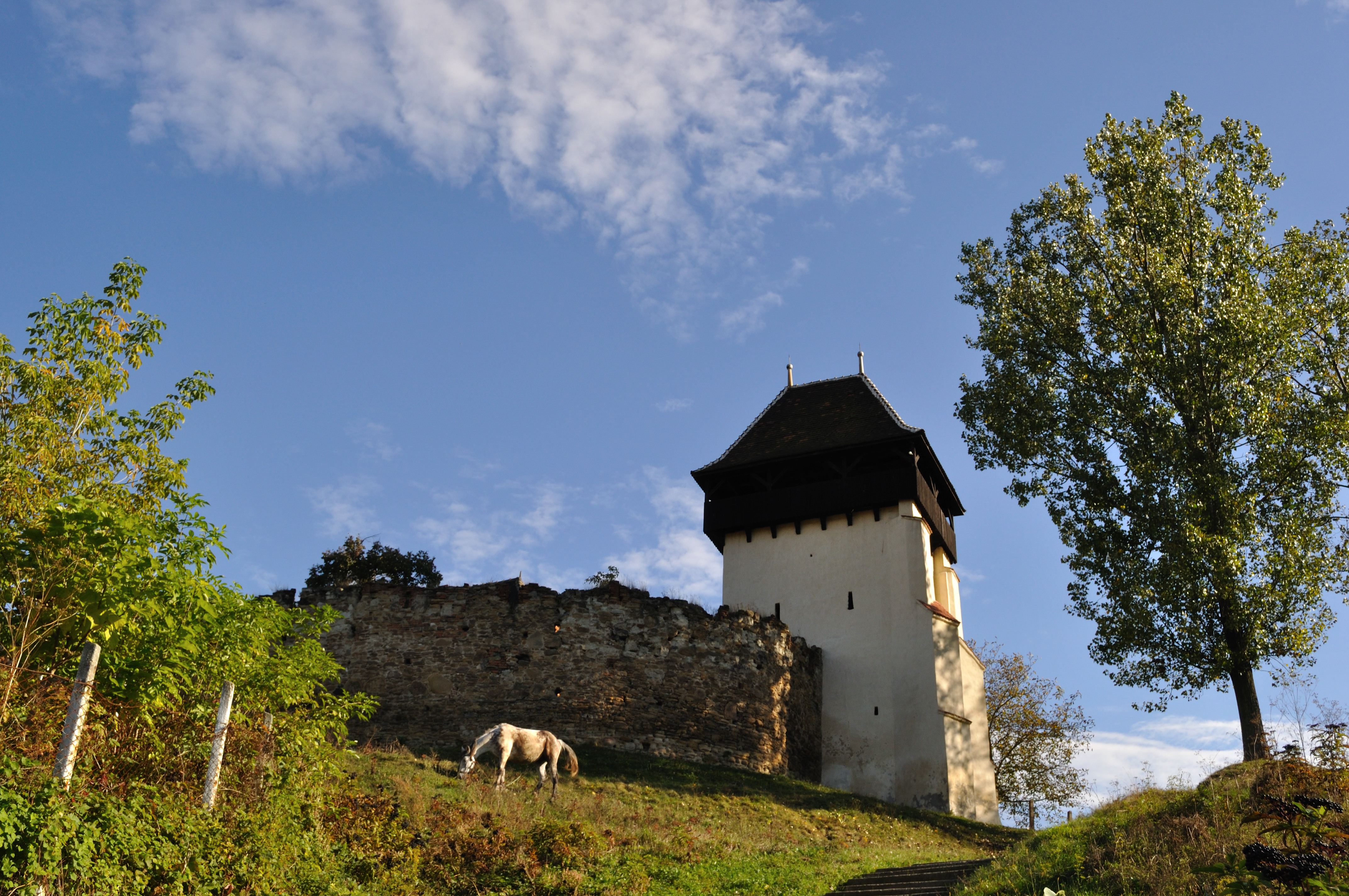 Biserica evanghelică fortificată din Țapu, Sibiu